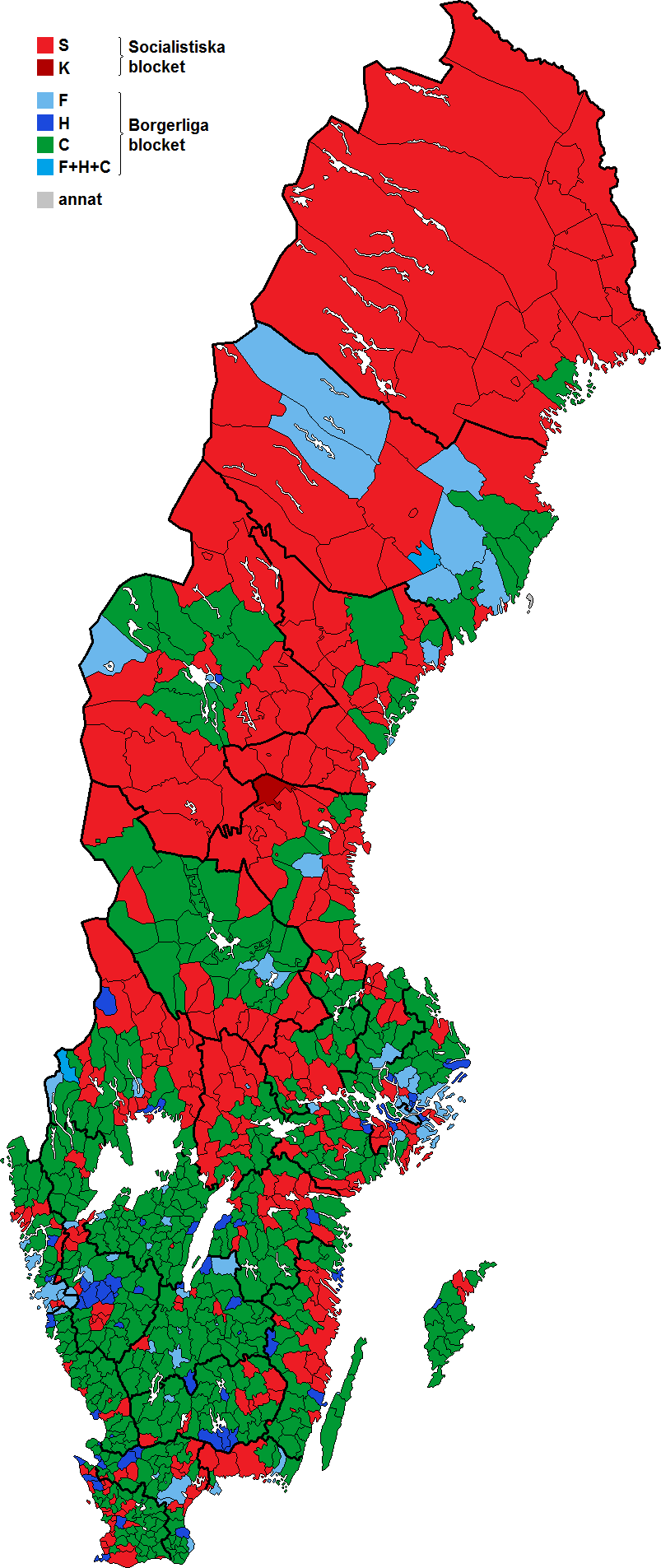 Största parti inom det ledande blocket i samtliga 900 kommuners kommun- och stadsfullmäktige efter kommunalvalet 1966. I kommuner där blocken fick lika många mandat ha röstetal avgjort färgen. Grå färg används för Holmöns landskommun där inget av de etablerade partierna hamnade i kommunfullmäktige.